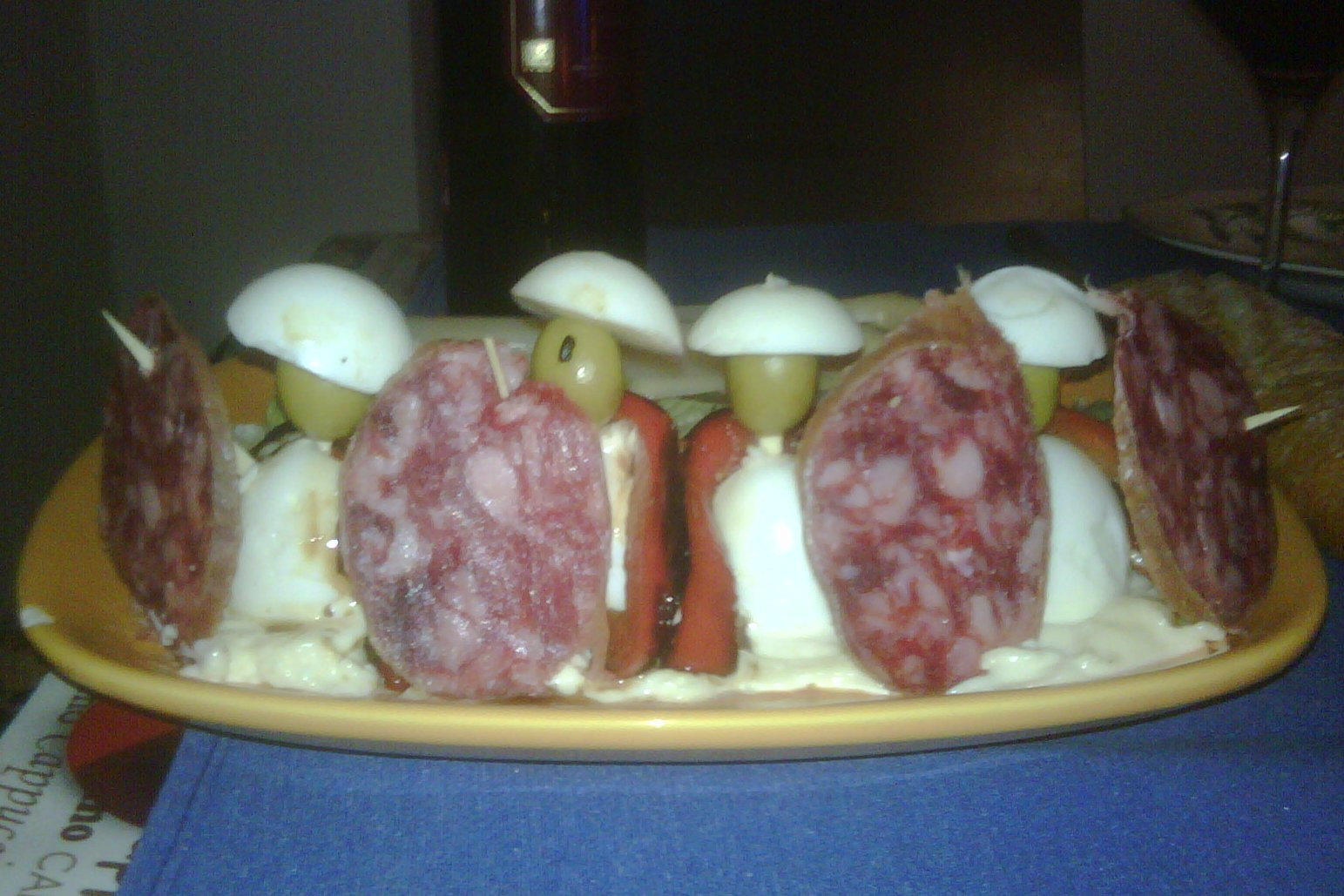 Variante de la tapa conocida como bobata.